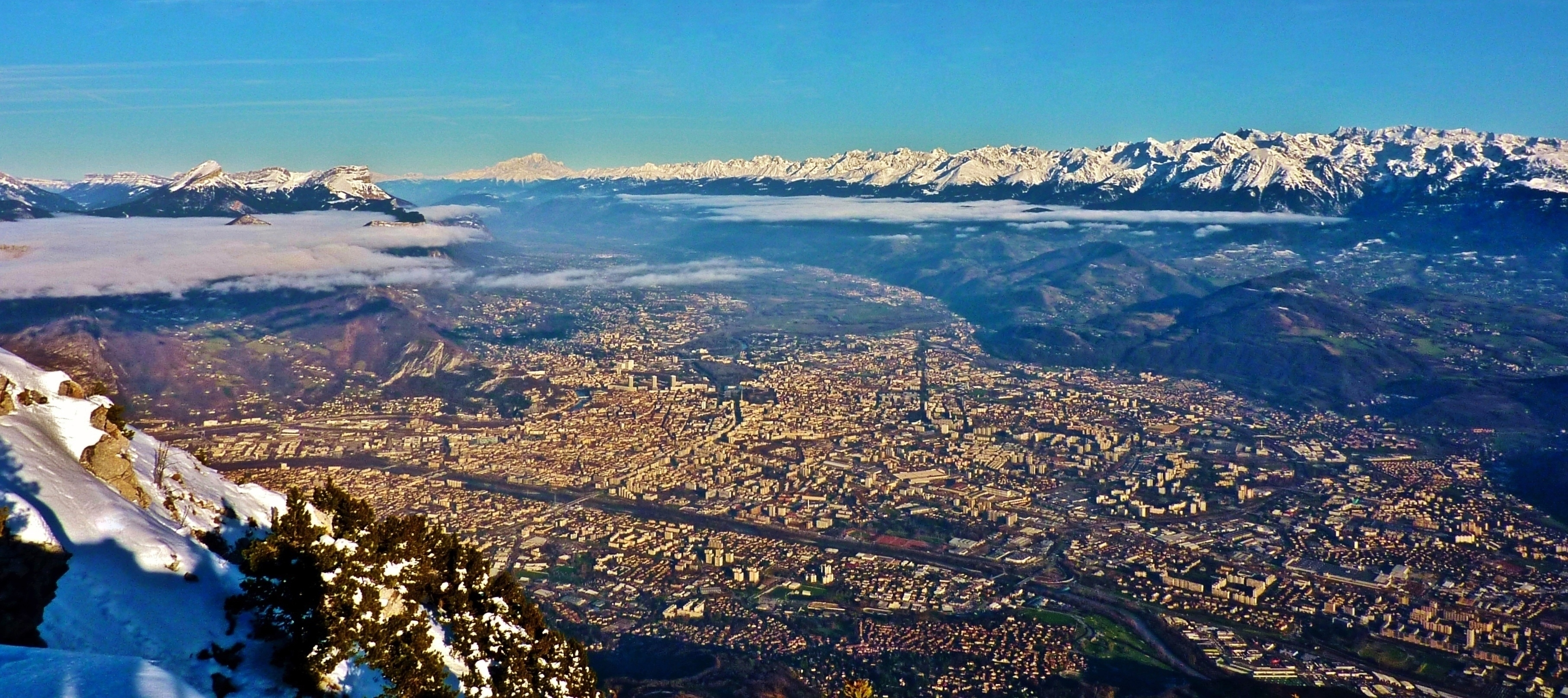 Vue sur l'agglomération Grenobloise depuis le sommet du Moucherotte (1901 m). Vue sur les massifs de Chartreuse, du Mont Blanc, de Belledonne et des Grandes Rousses.